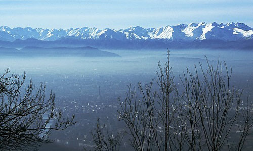 Torino, view from Basilica di Superga, (Italy).